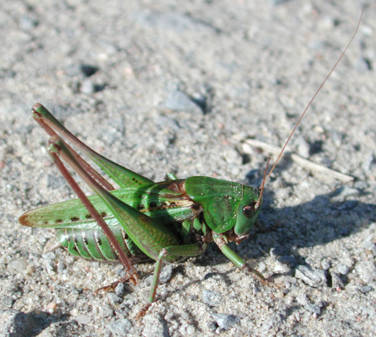 Decticus verrucivorus, m., Warzenbeißer, Männchen, NSG Lüneburger Heide, Deutschland